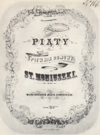 The cover of Stanisław Moniuszko's "Śpiewnik domowy" songbook